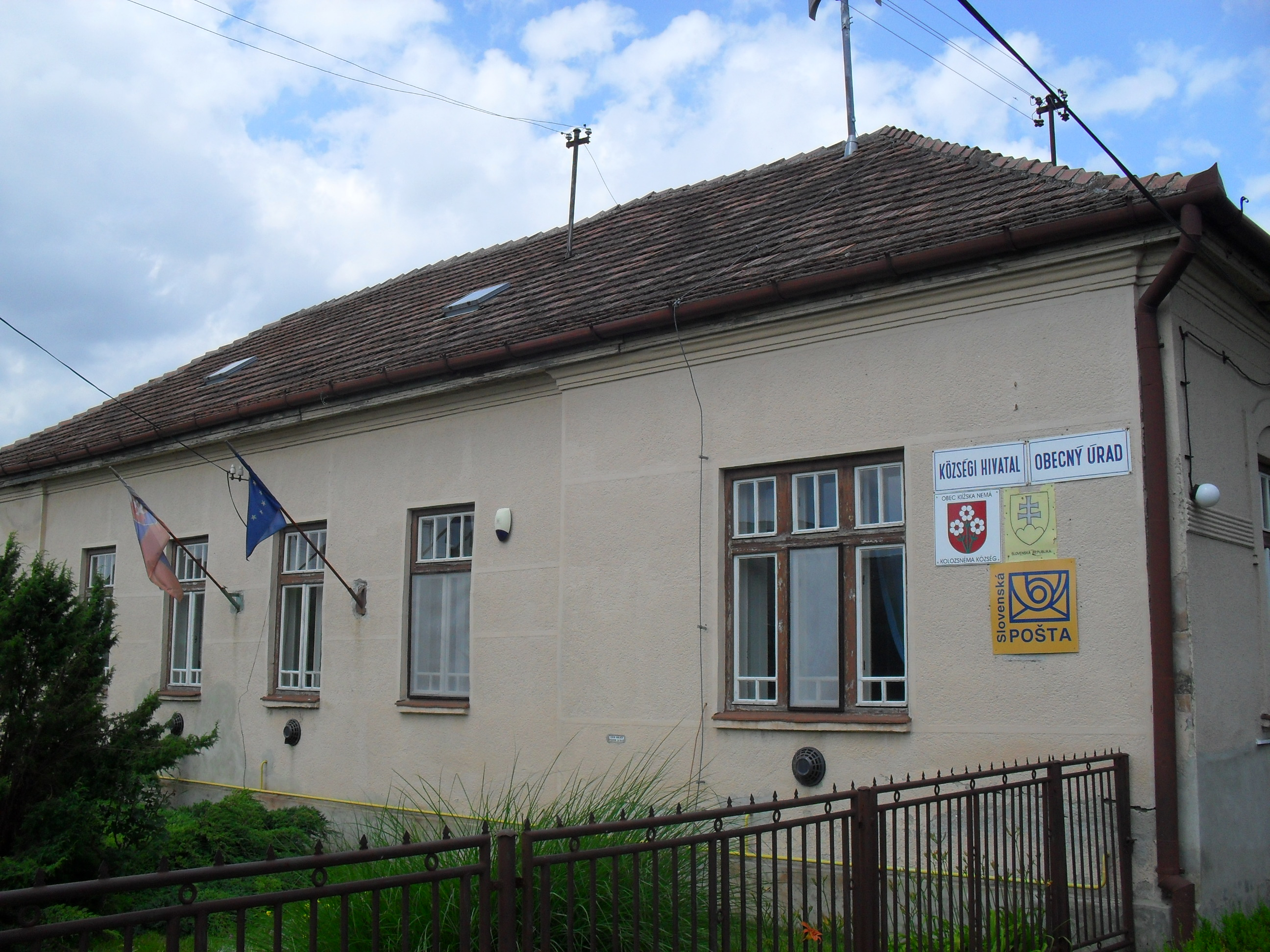 Kolozsnéma - községi hivatal